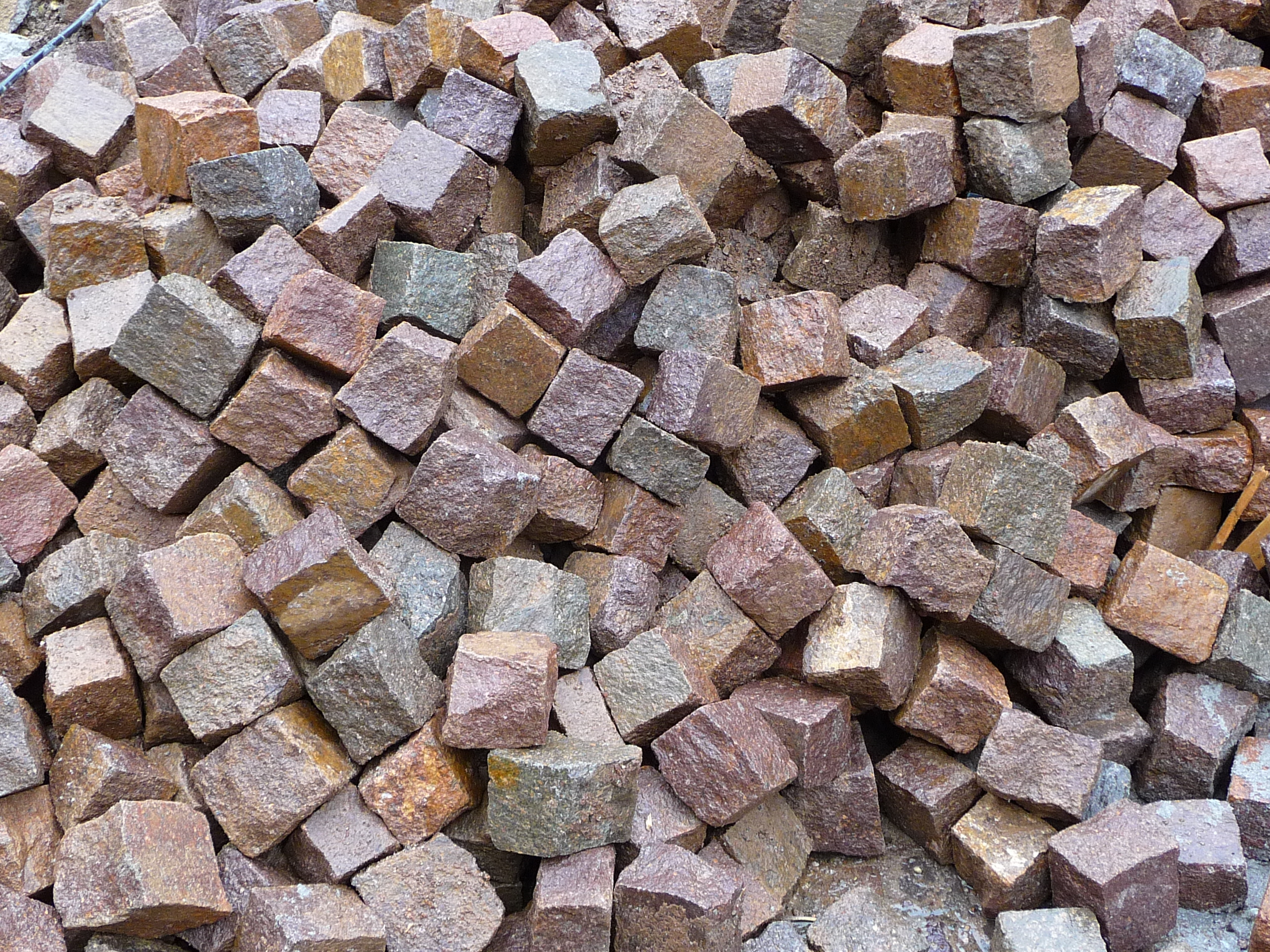 Haufen Pflastersteine vor der Verlegung